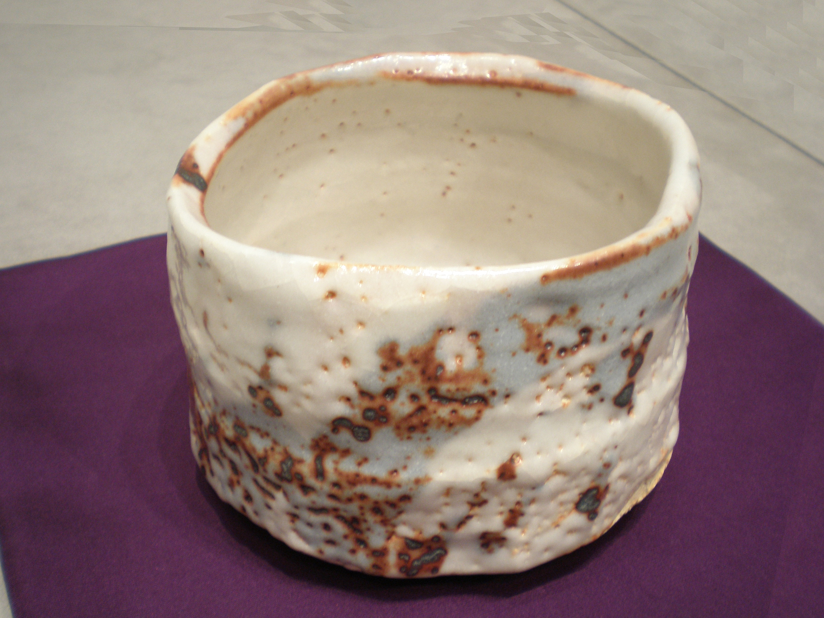 越前陶芸村で活動されている、陶芸家・山田和氏の作品。2011年9月10日、JR大阪三越伊勢丹・美術画廊での個展を撮影。